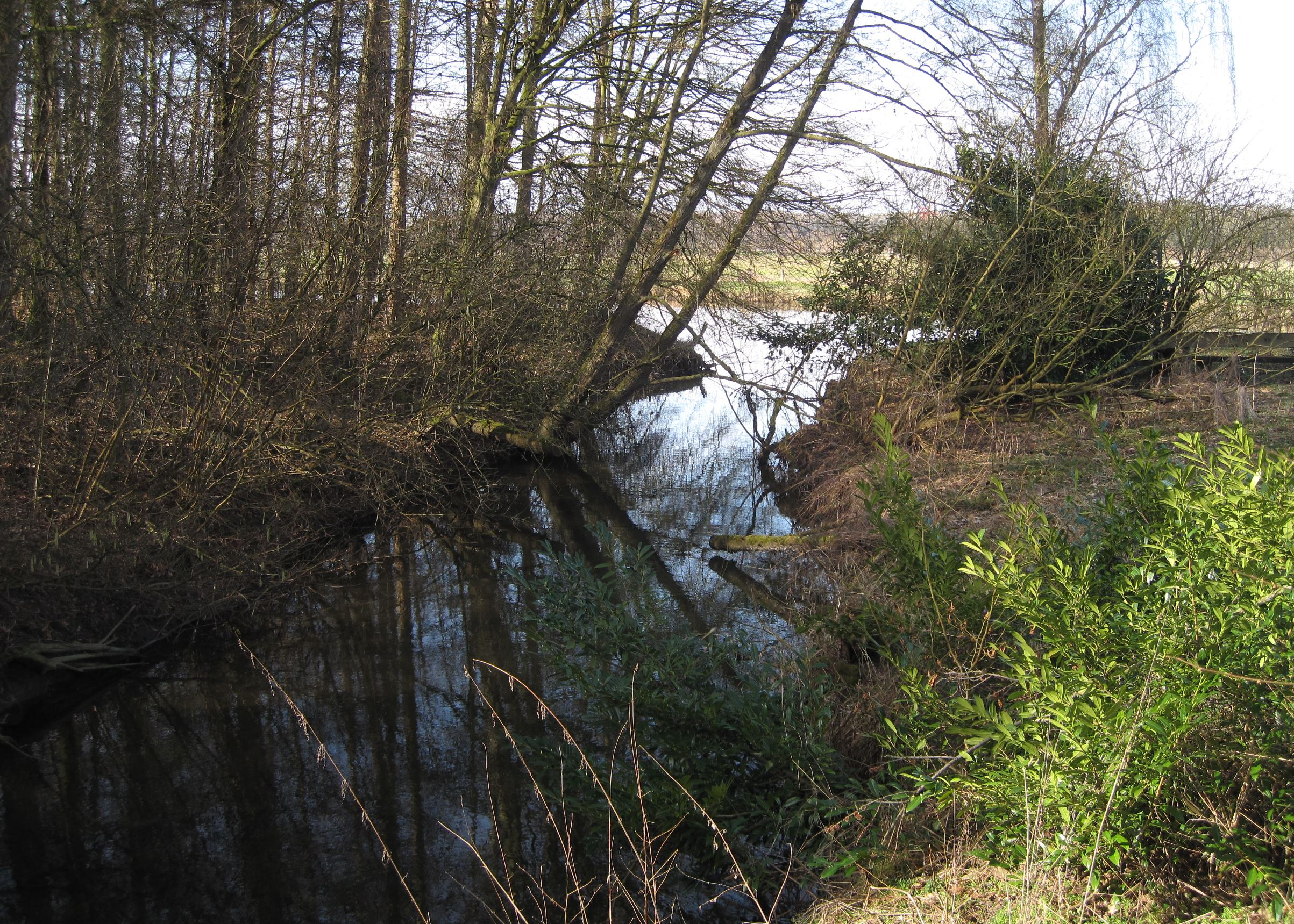 Abbabach an der Mündung in die Ruhr in Iserlohn-Drüpplingsen.